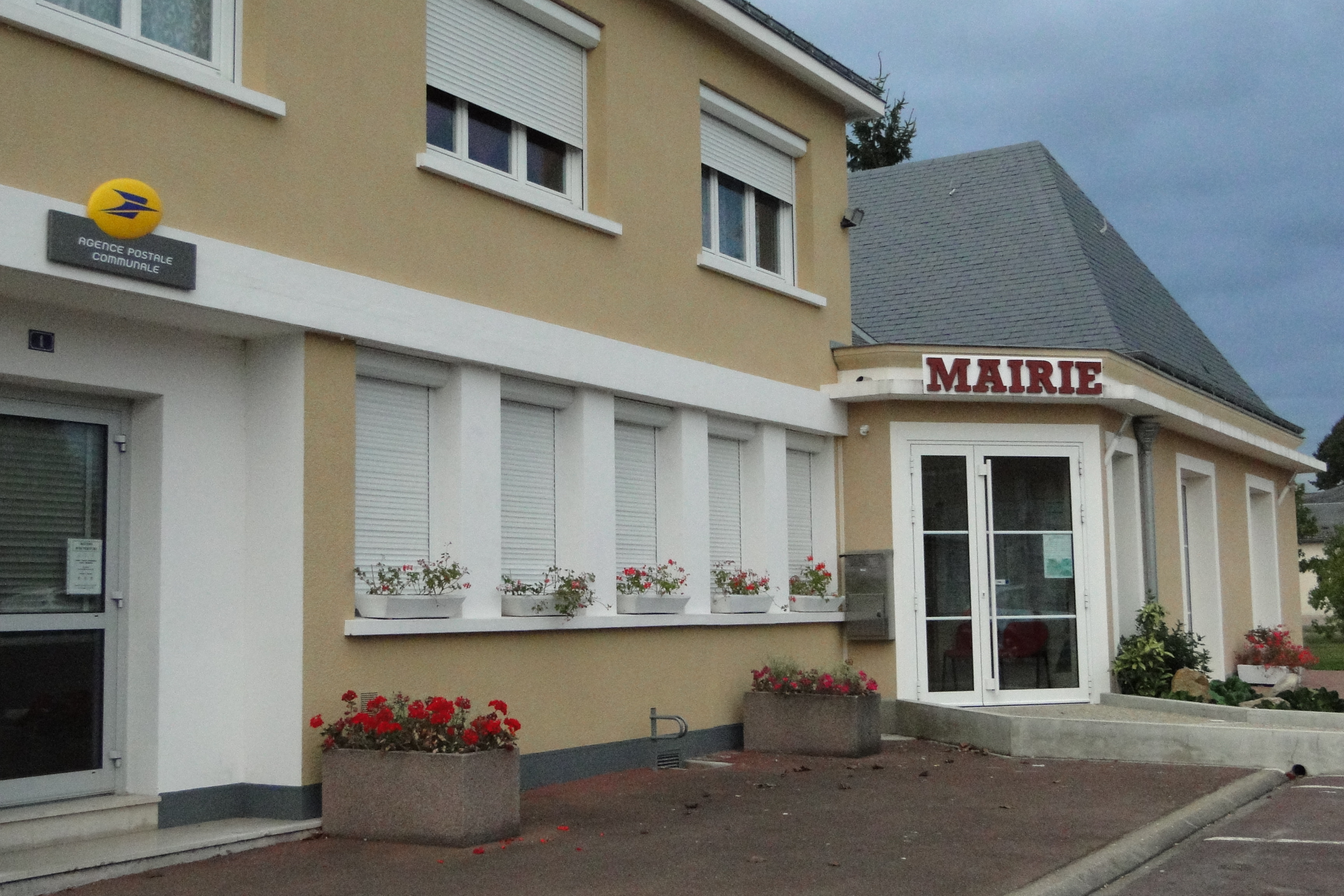 Mairie de Oizé (Sarthe)